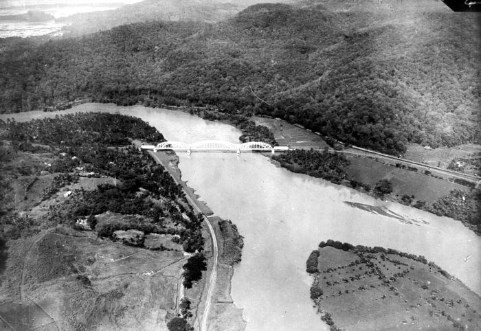 Repronegatif. Foto udara di atas Kali Serayu dengan jembatan kereta api antara Purwokerto dan Kroya.